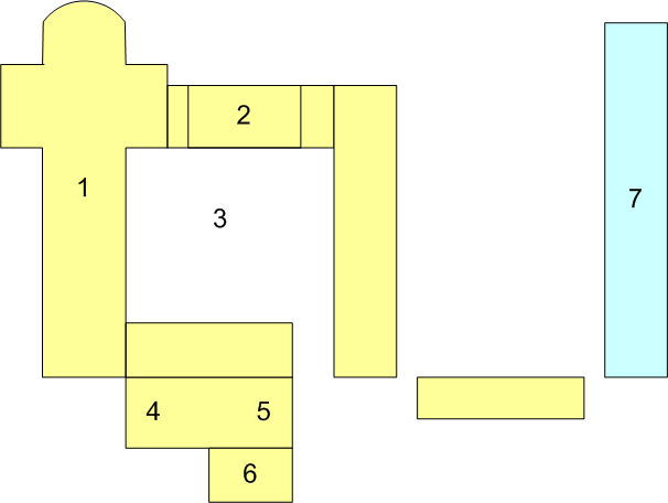 eigen werk. plattegrond van de gebouwen van de Abdij van Beaulieu in het departement Tarn-et-Garonne